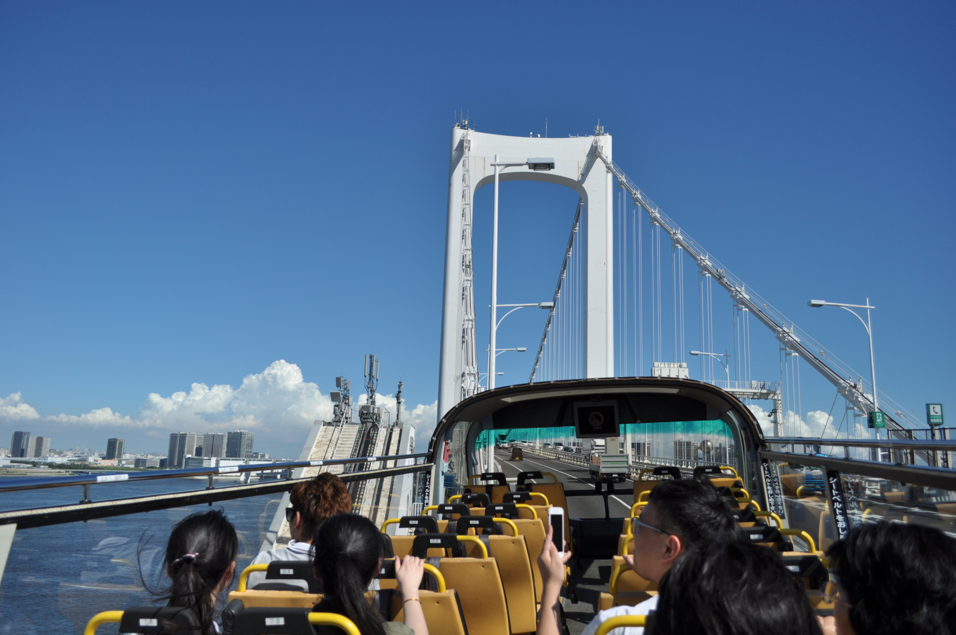 スカイバス東京